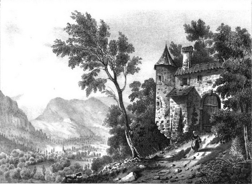 vallée de Vaulnaveys, vue près du chateau d'Uriage